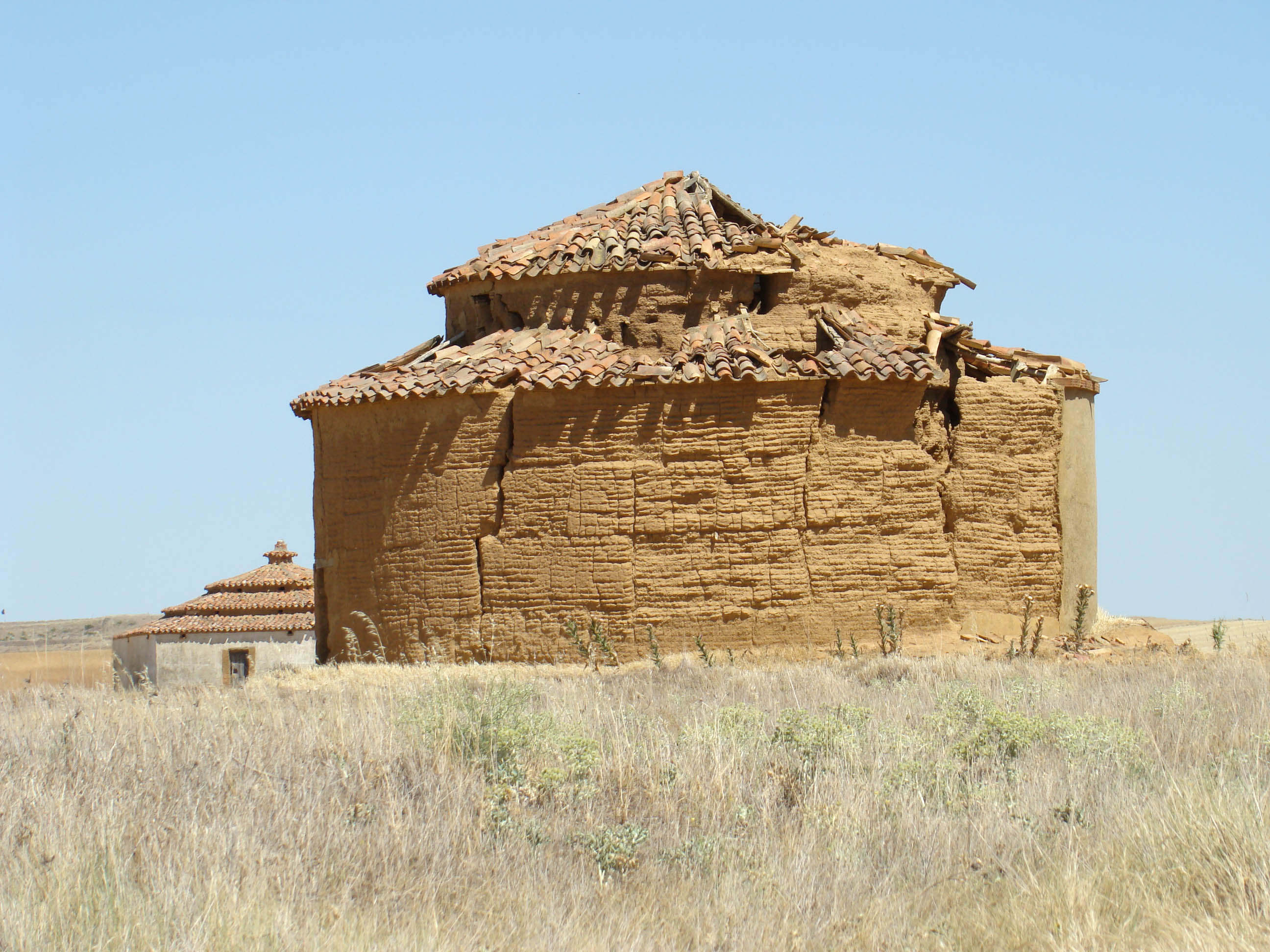 Palomares en el municipio de Barcial de la Loma, provincia de Valladolid (España) en la comarca de Tierra de Campos.